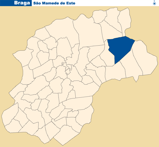 Localização de São Mamede de Este no concelho de Braga.